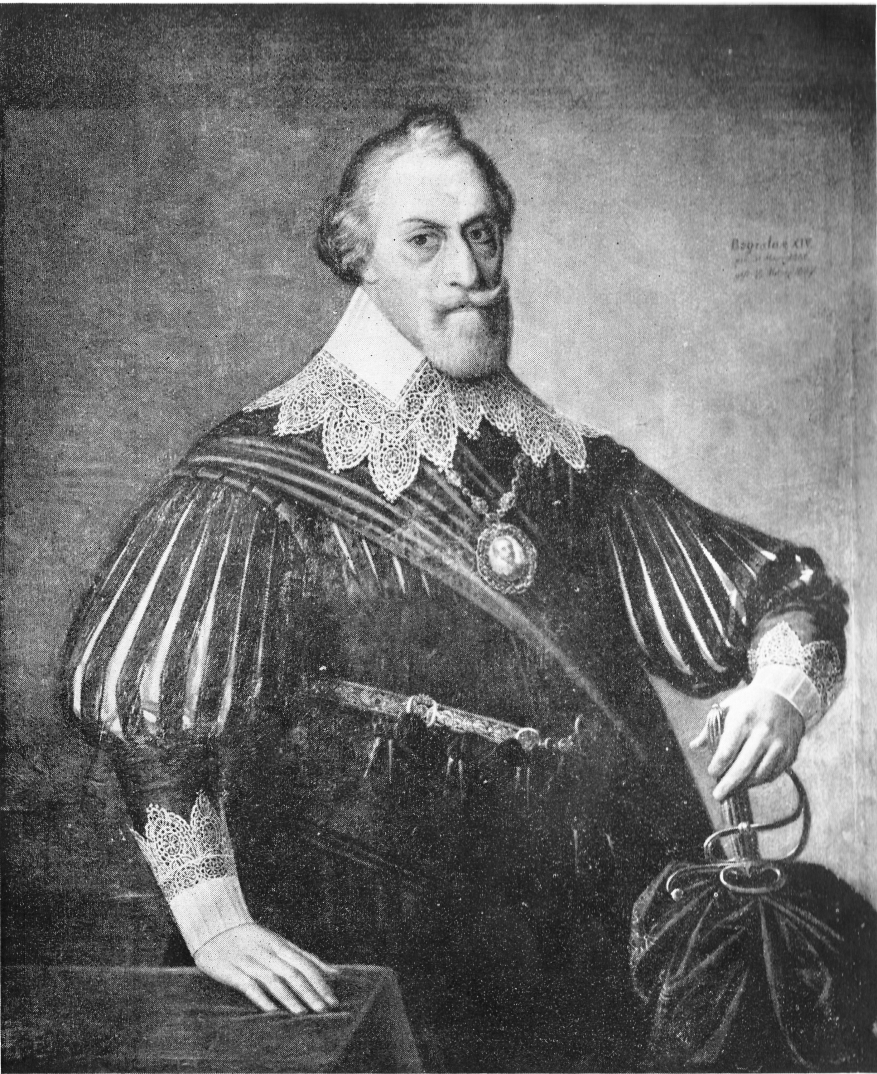 Ölgemälde von Herzog Bogislaw XIV. von Pommern, seit 1945 verschollen